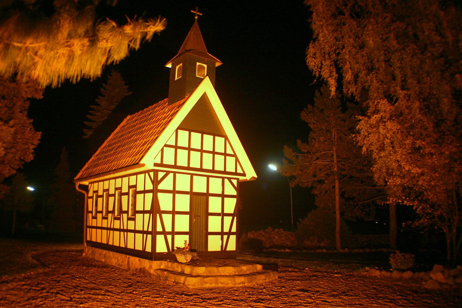 Die neue Oppenweher Klus bei Nacht